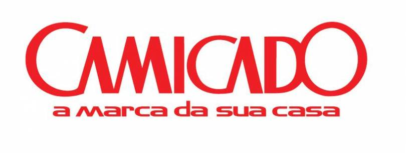 Logomarca Lojas Camicado